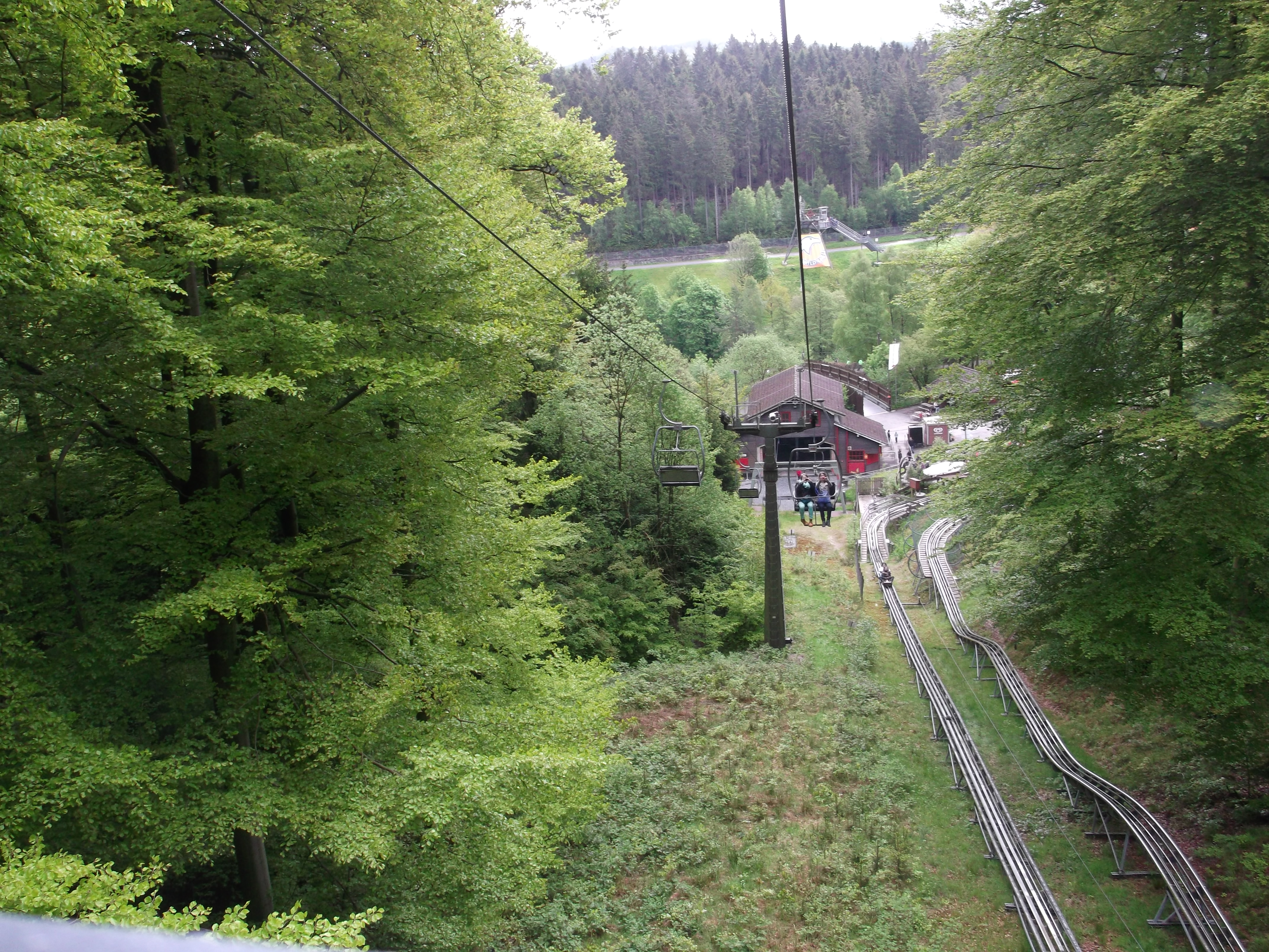 Ein Blick aus dem fahrenden Sessellift ins Tal